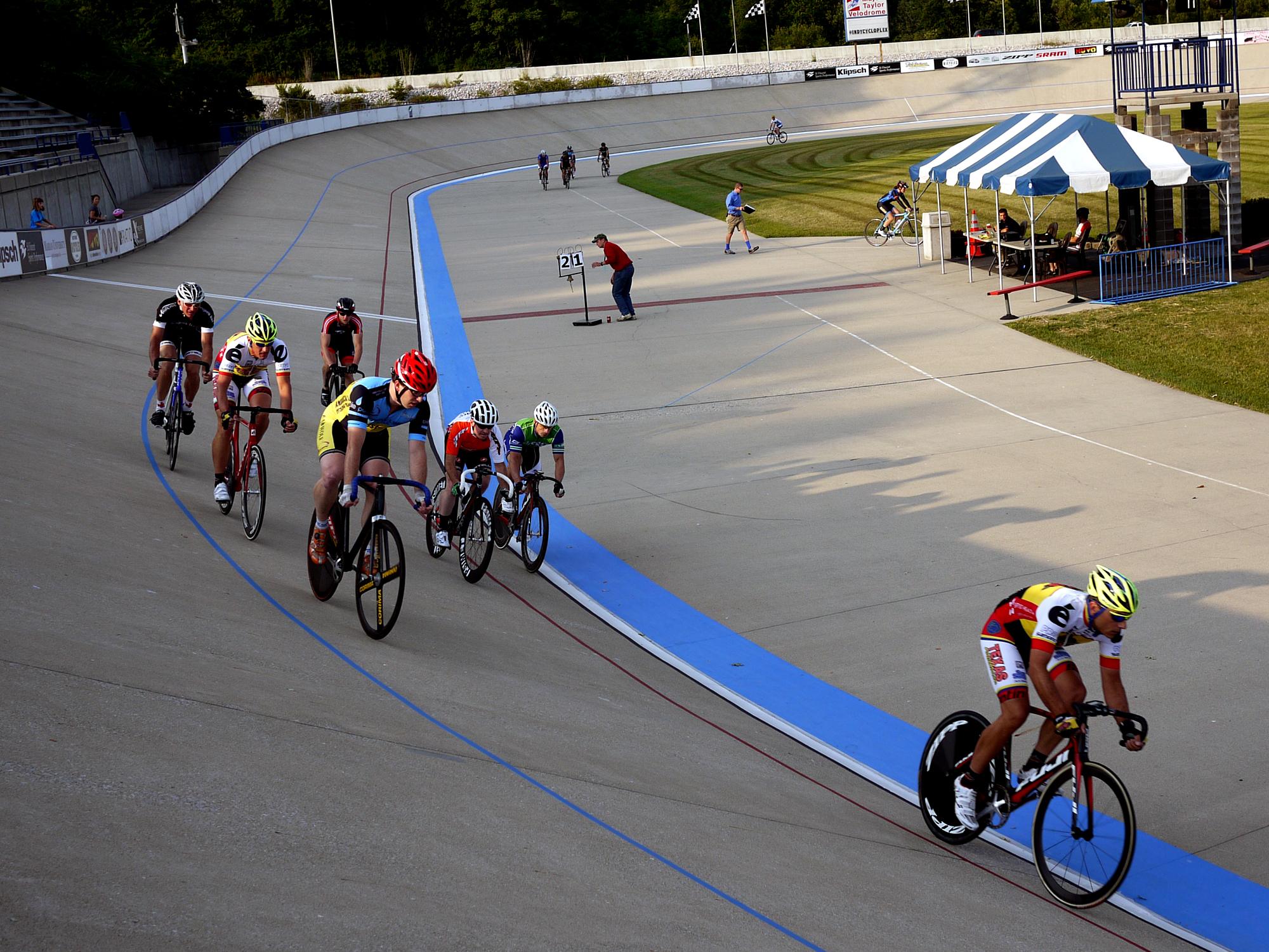 Major Taylor Velodrome